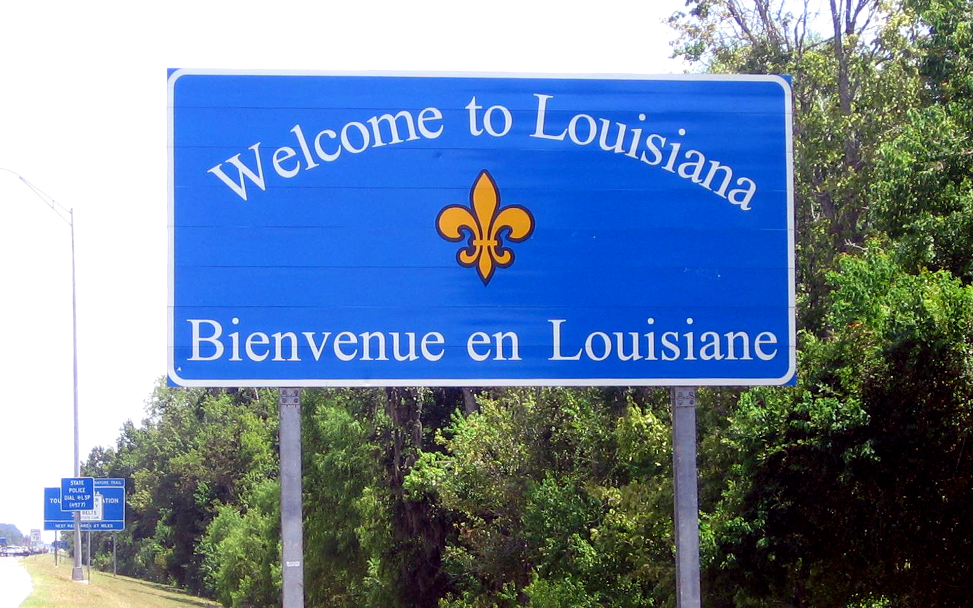 Signalisation routière bilingue à l'entrée de la Louisiane Français cadien: Panneau d'entrée bilingue à l'entrée de la Louisiane